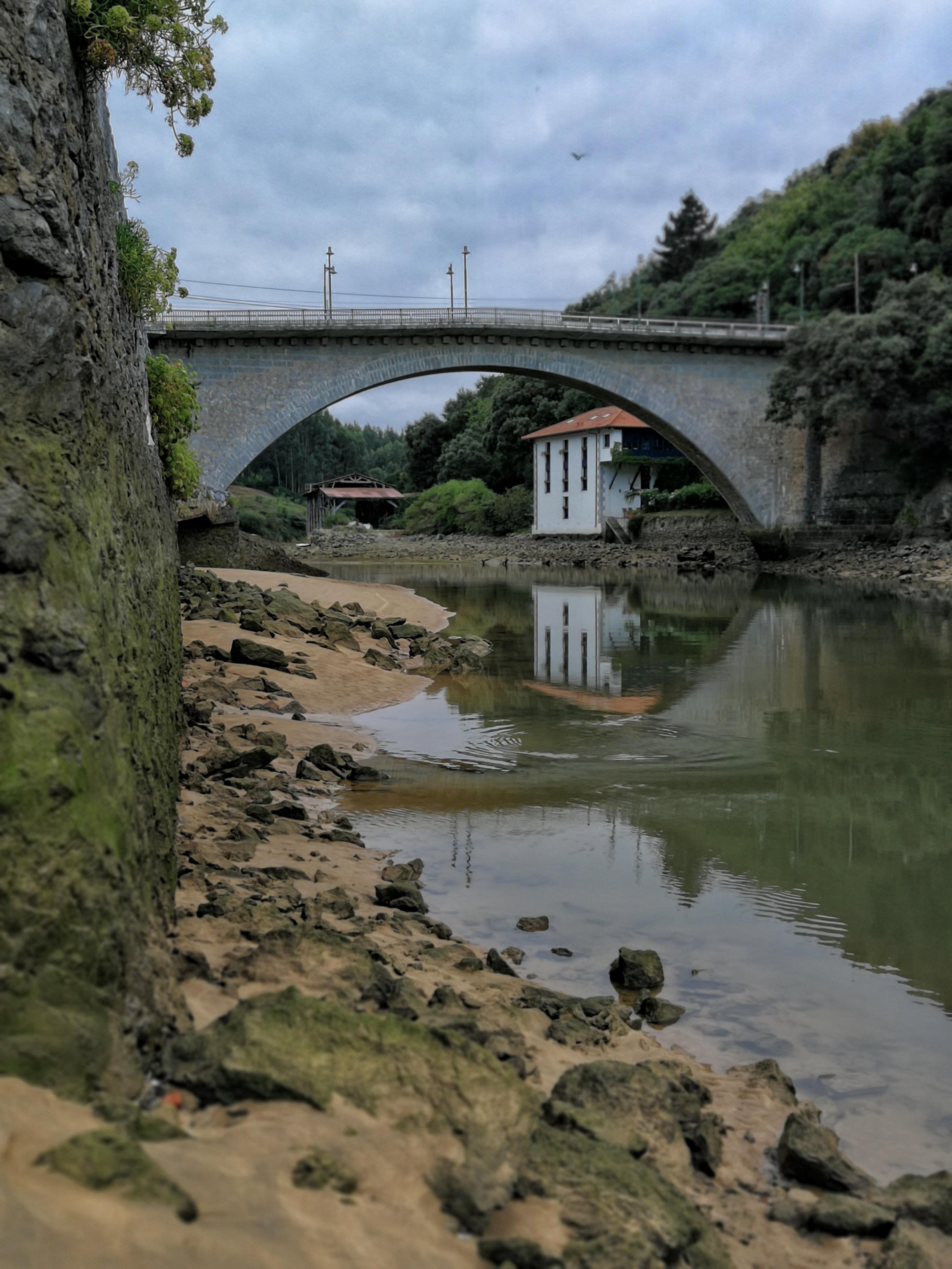 Isuntza zubia